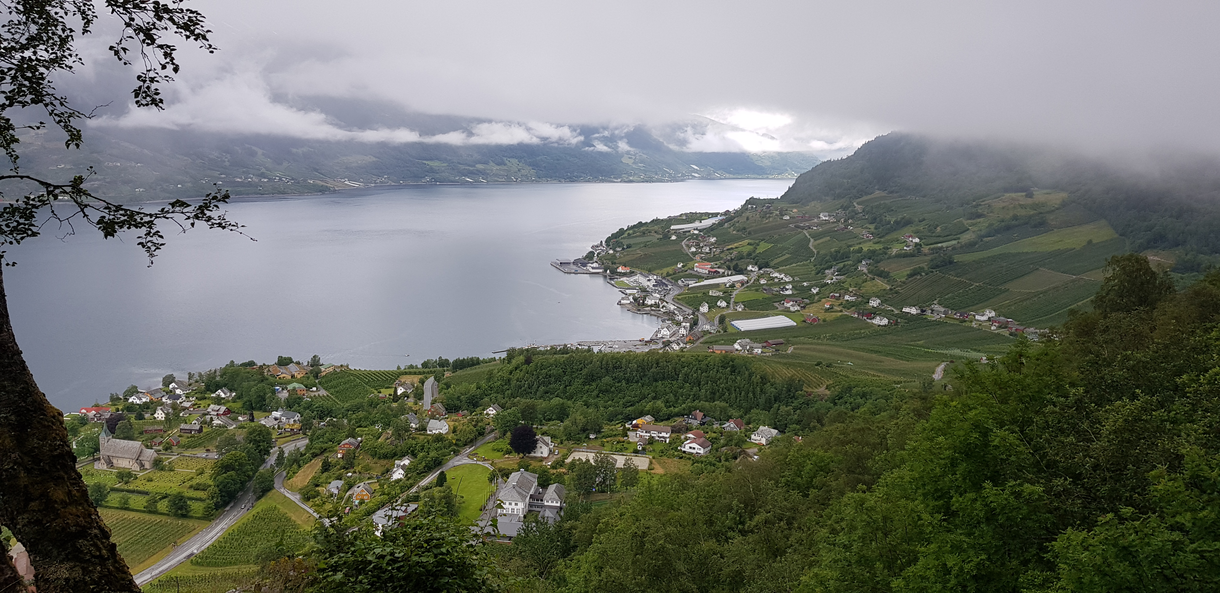 Lofthus med sentrum i midten av bildet, Lofthus kirke til venste, og Hardanger folkehøgskule i forgrunnen.